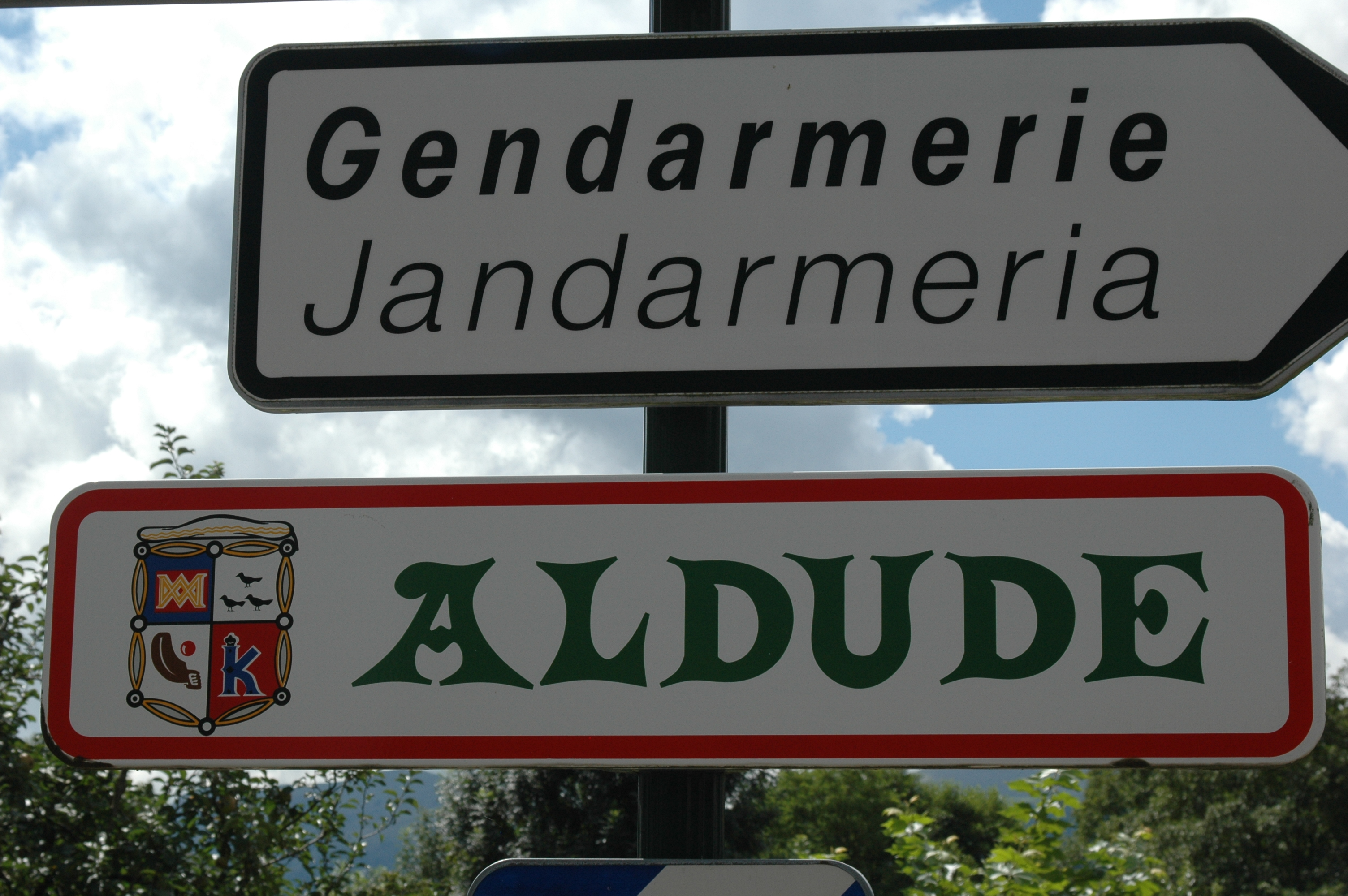 Aldudes, panneau indicateur et blason